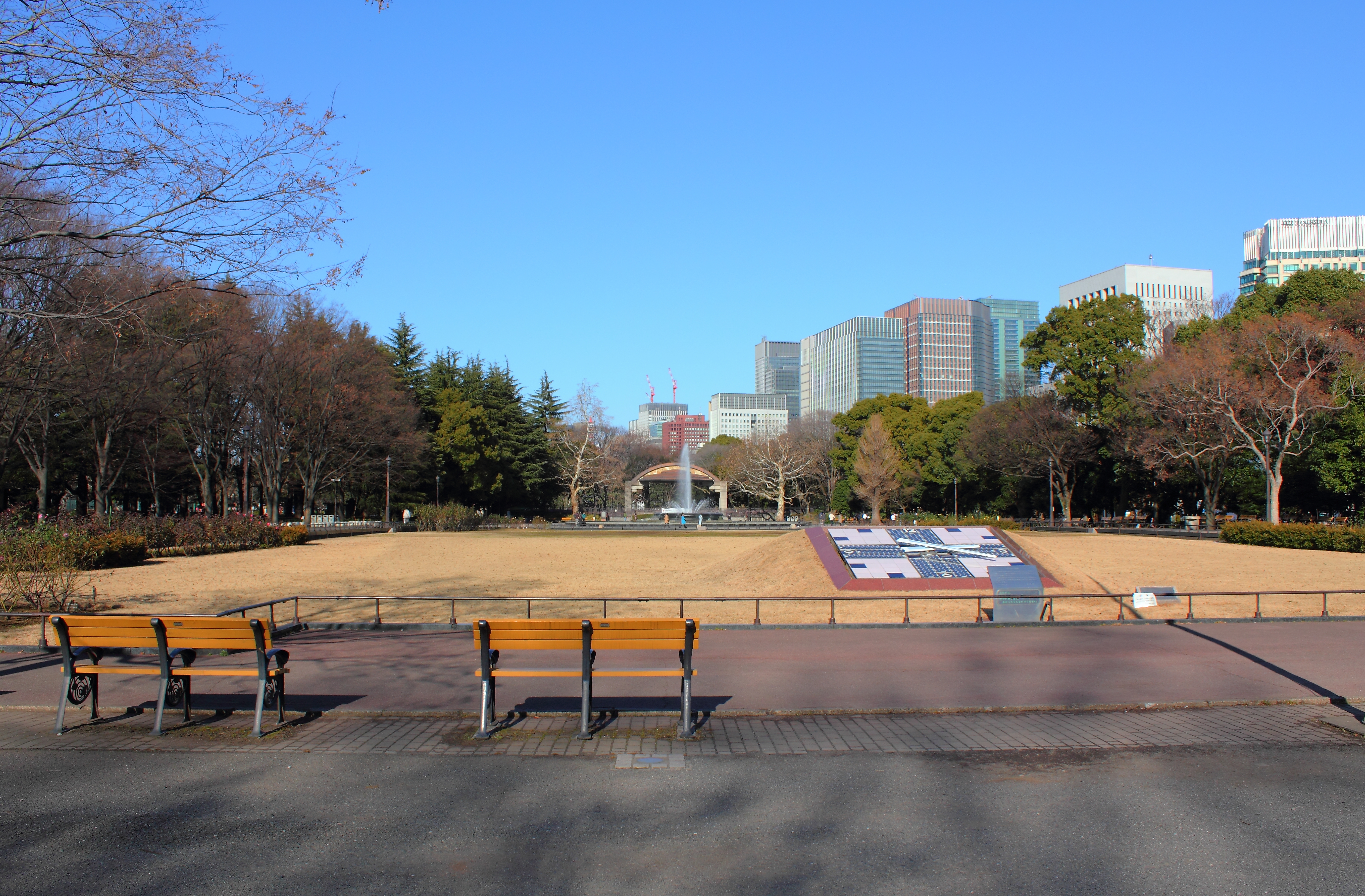 日比谷公園2012